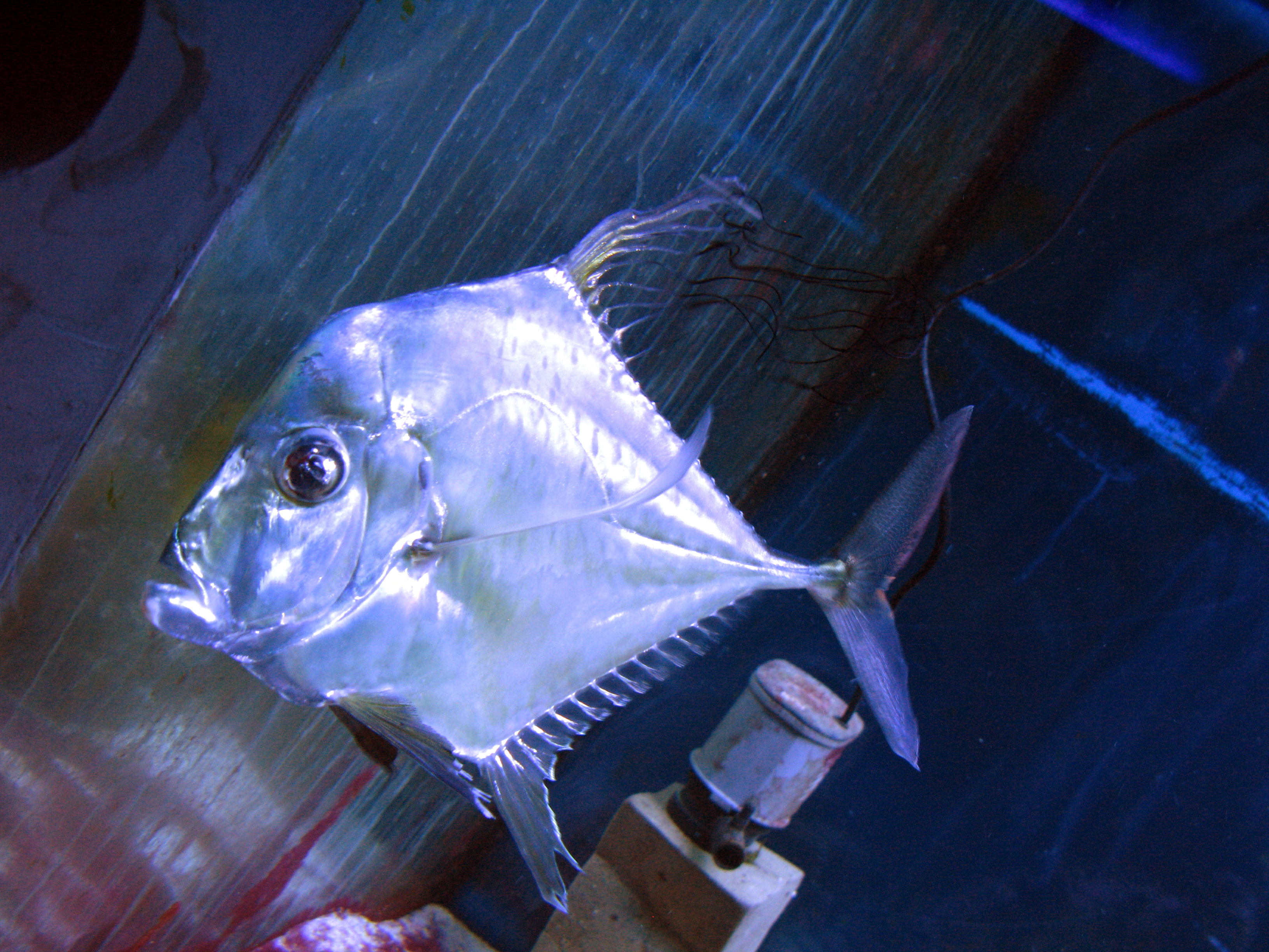 Alectis indica